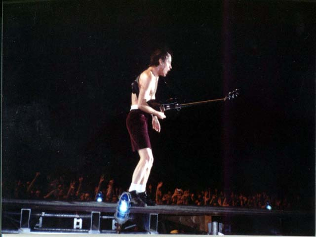 Angus Young (AC/DC) at Prague